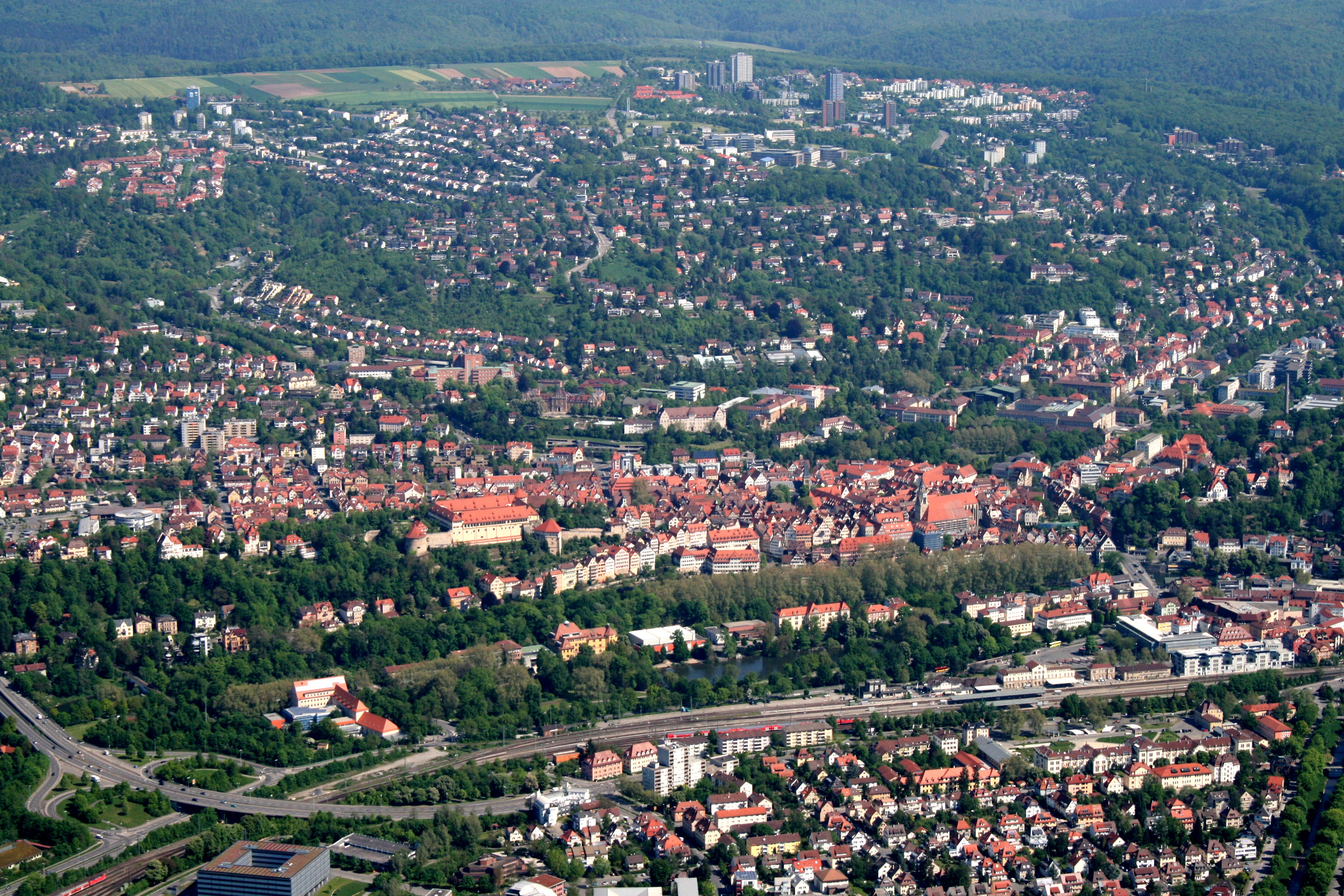 Luftaufnahme von Tübingen